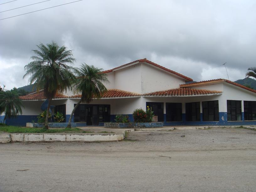 Terminal de omnibus de Jibacoa, en el municipio cubano de Manicaragua.